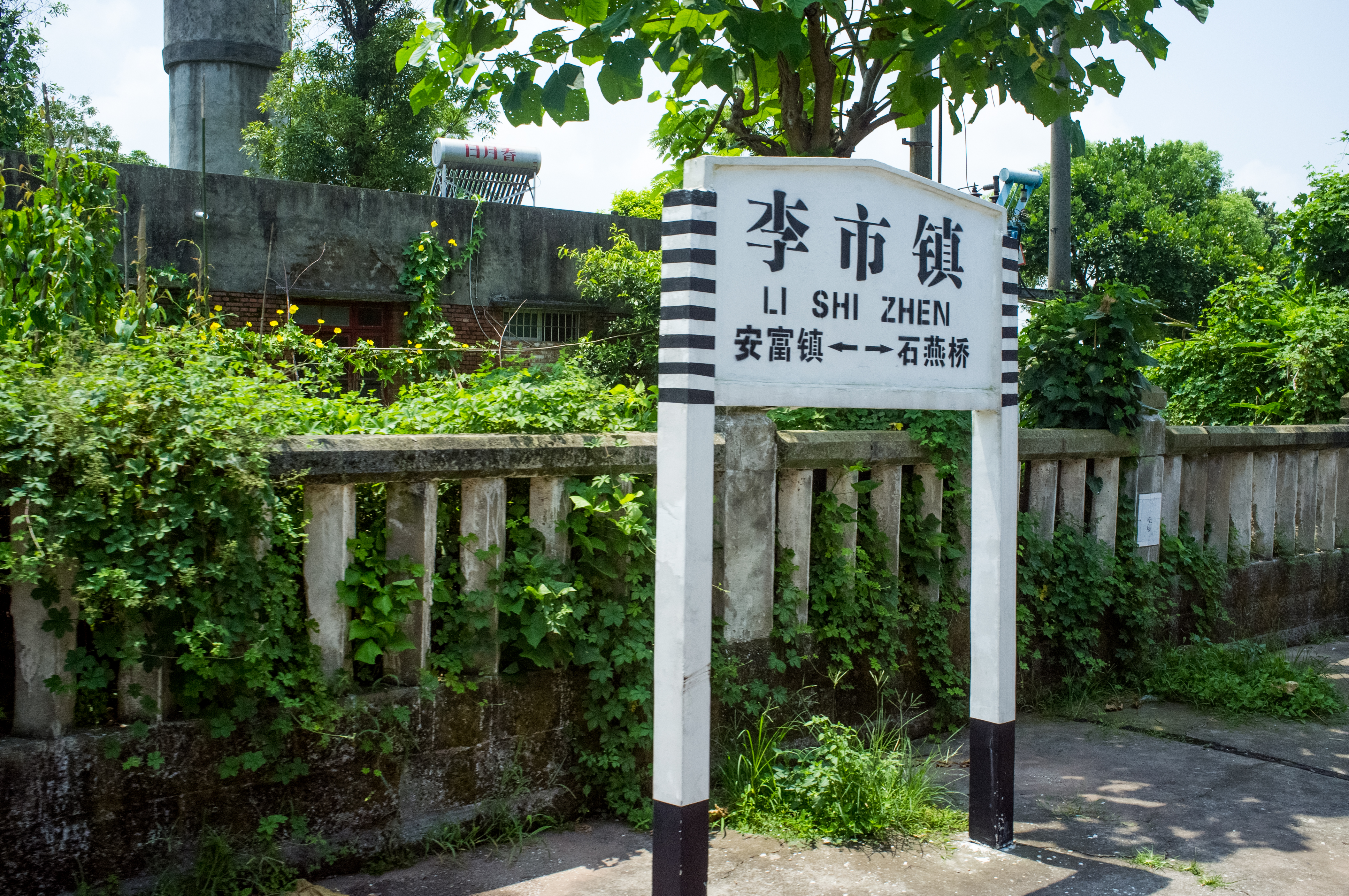 中文（中国大陆）: 成渝铁路李市镇站